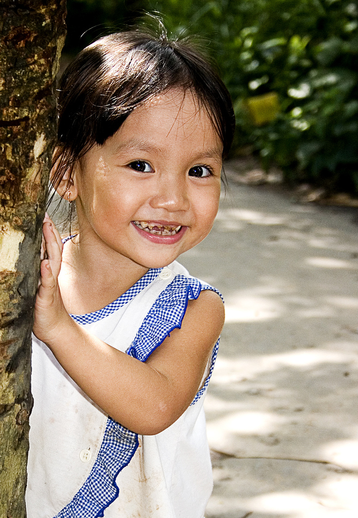 Girl in Mekong Delta